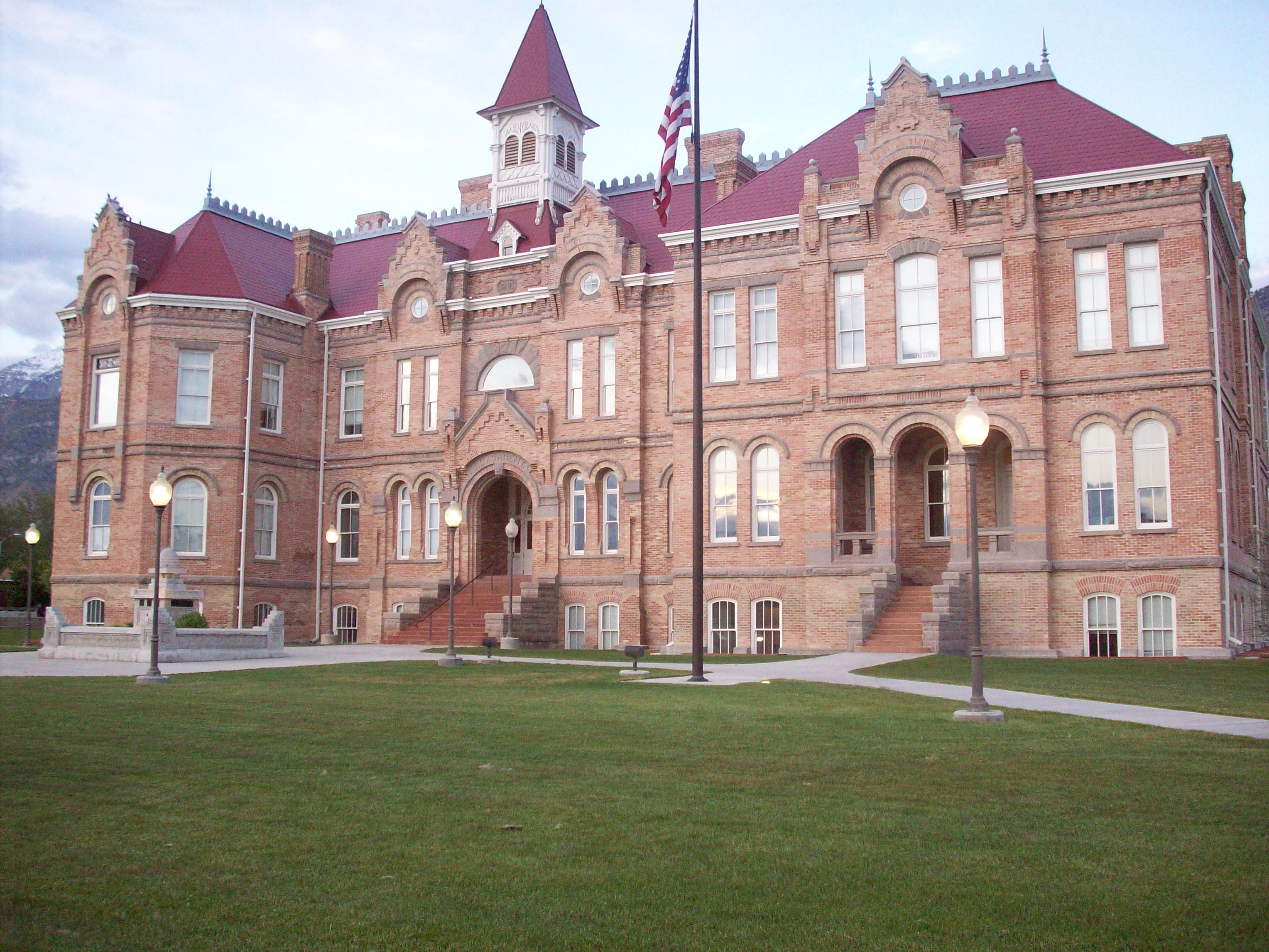 Provo Library at Academy Square